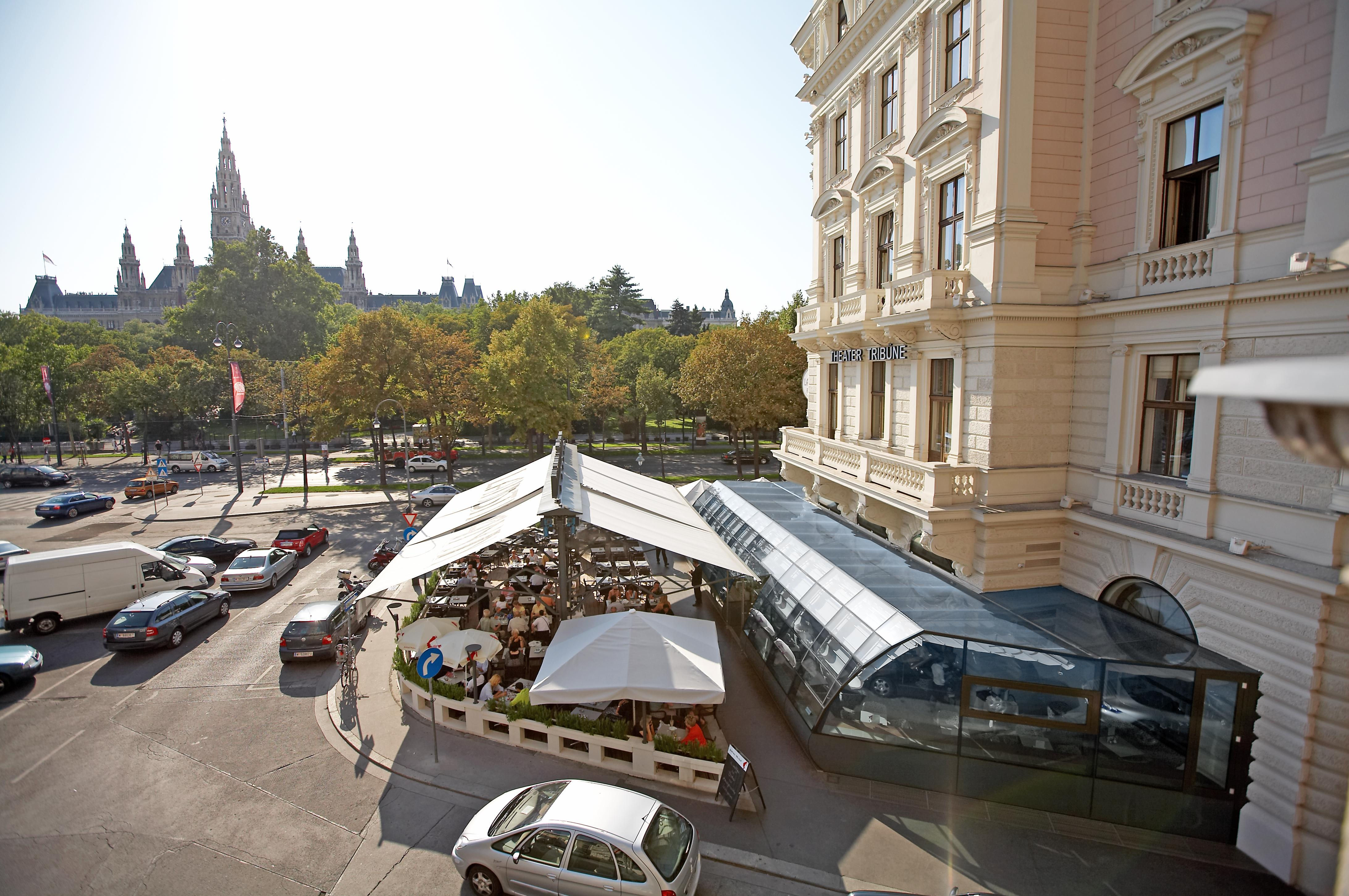 Aussenansicht auf Wintergarten und Schanigarten